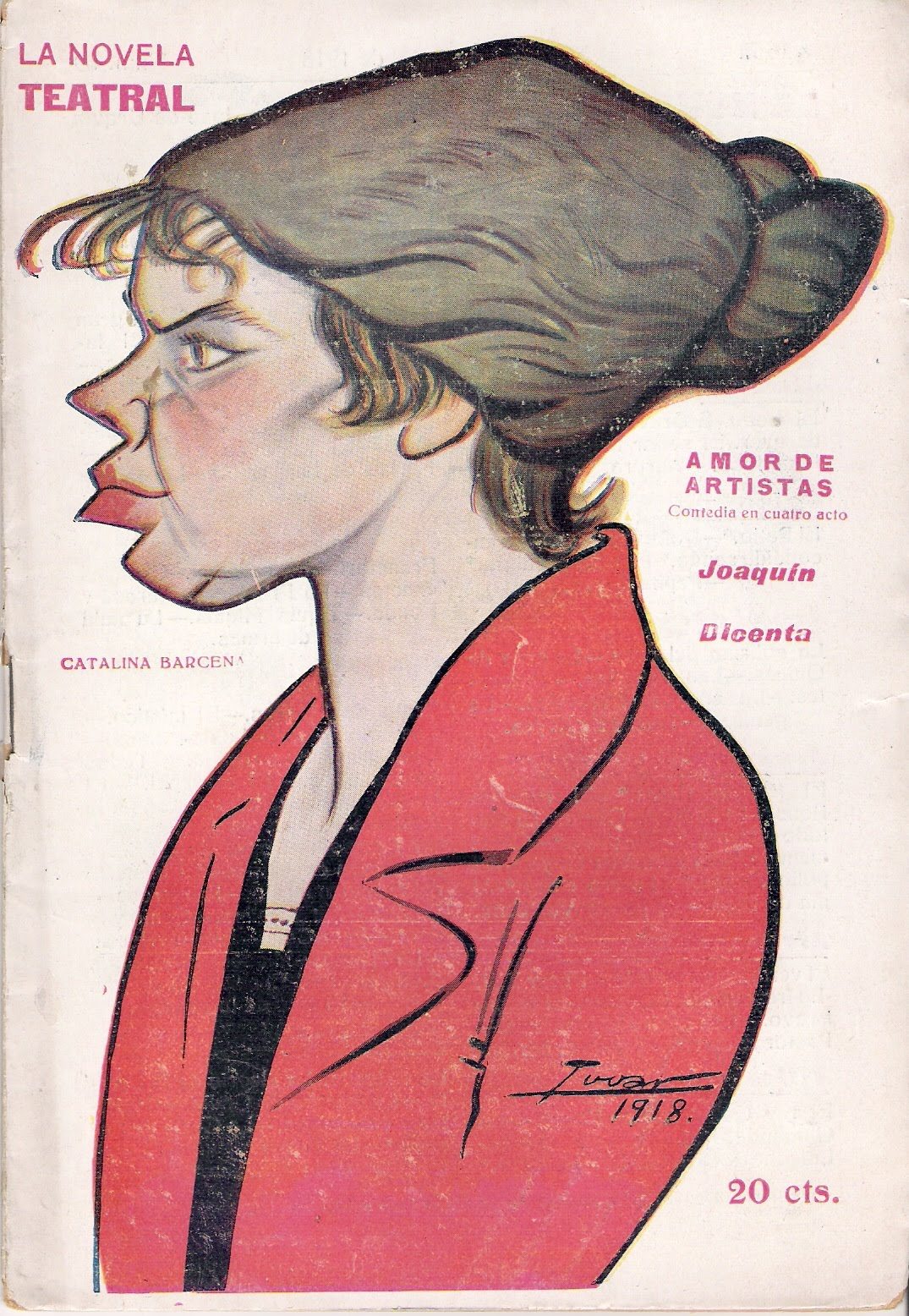 Catalina Bárcena.